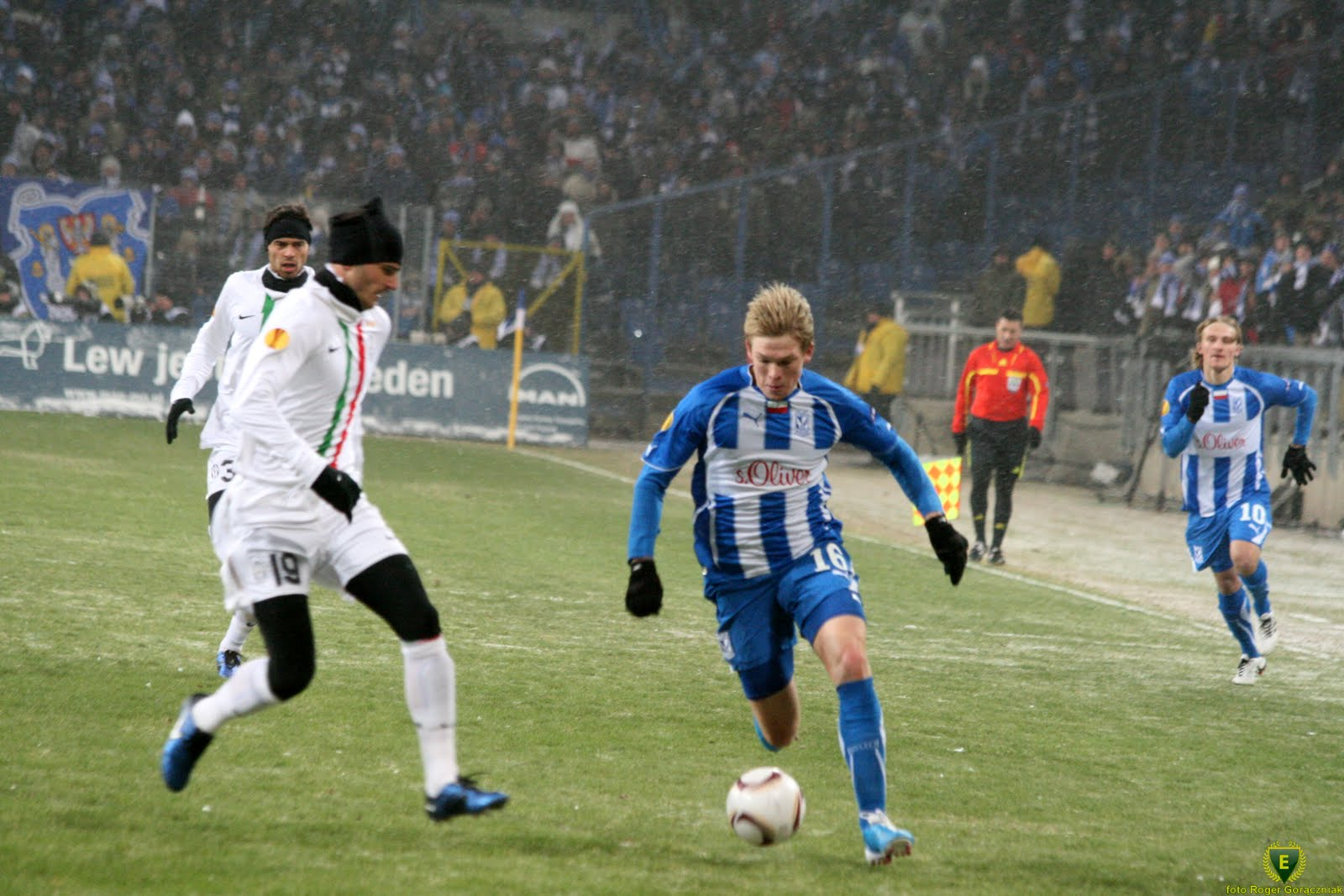 Artjoms Rudņevs (Lech Poznań) against Leonardo Bonucci (Juventus).